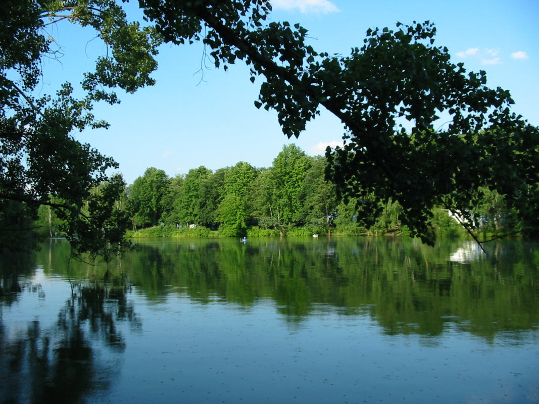 Blick auf den Schwanenteich, Privatarchiv